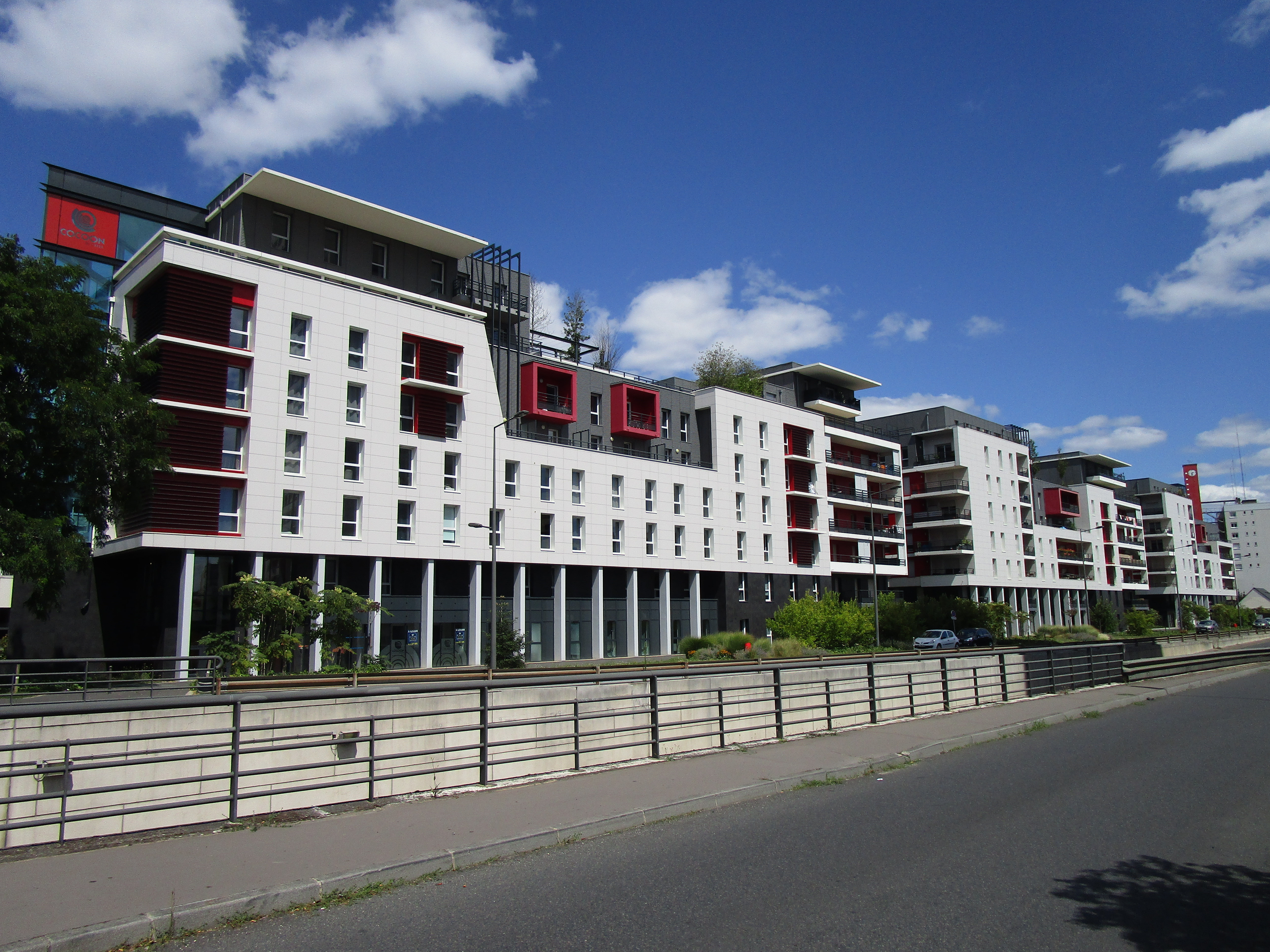 Immeuble sur le boulevard Richard Wagner à Tours, à proximité de la place de Verdun.